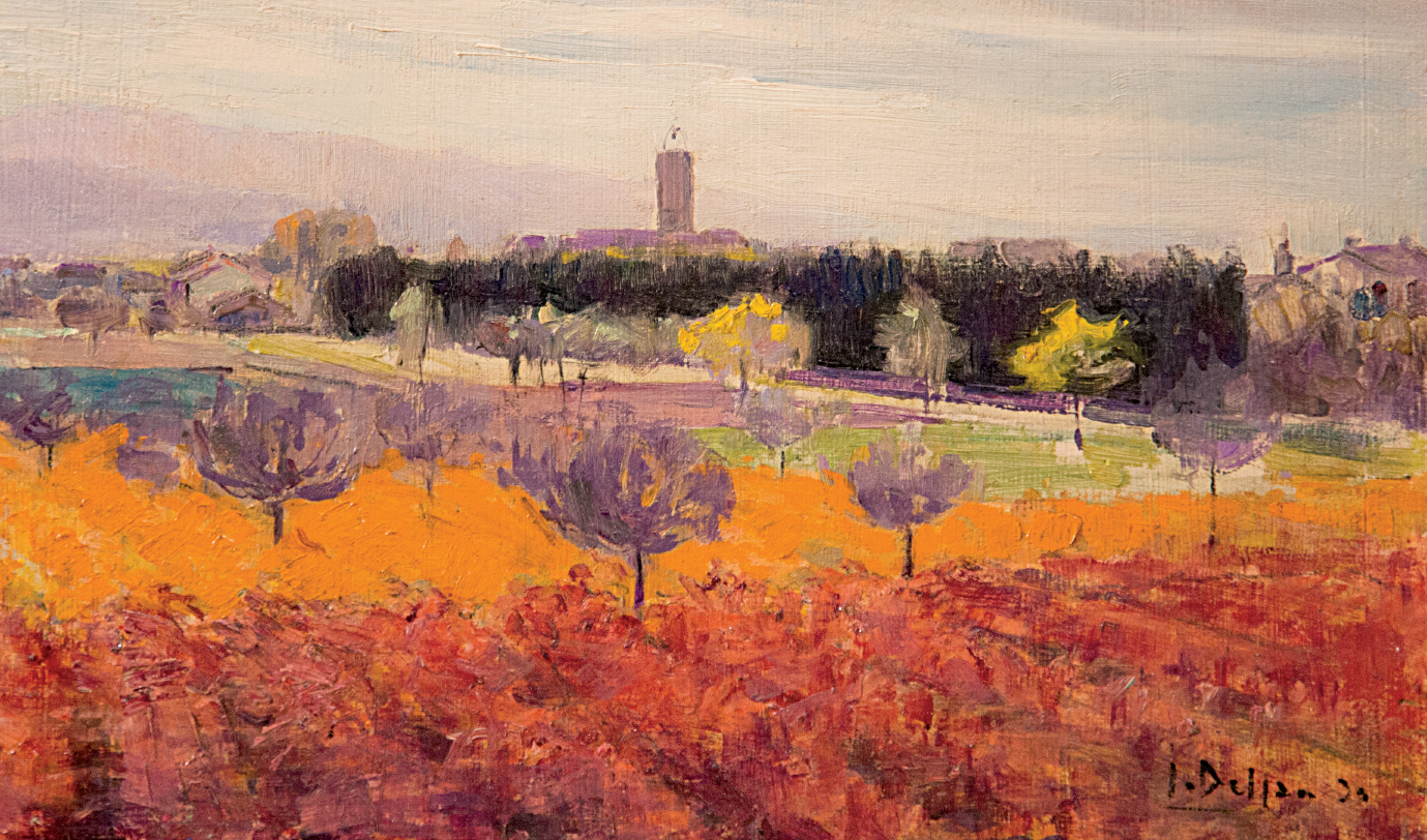 Louis Delfau Lumières en Roussillon